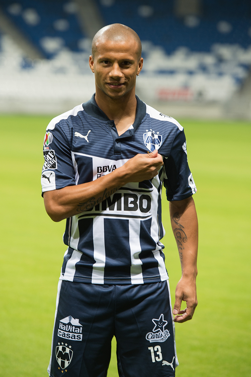 Carlos Sanchez en el estadio BBVA Bancomer